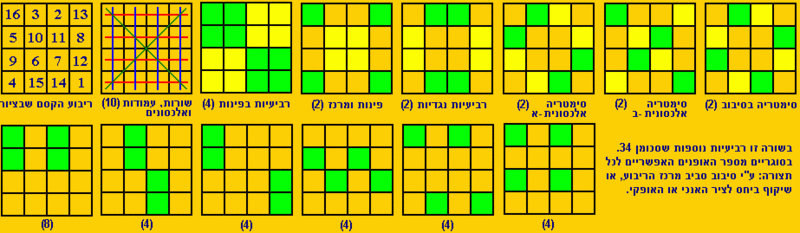 דירר, מלנכוליה - ריבוע הקסם, אילוסטרציה שציירתי בעצמי, ואין עליה זכויות יוצרים